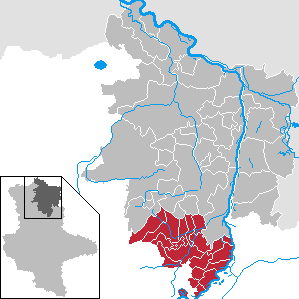 Verwaltungsgemeinschaft Tangerhütte-Land in Sachsen-Anhalt - Landkreis Stendal